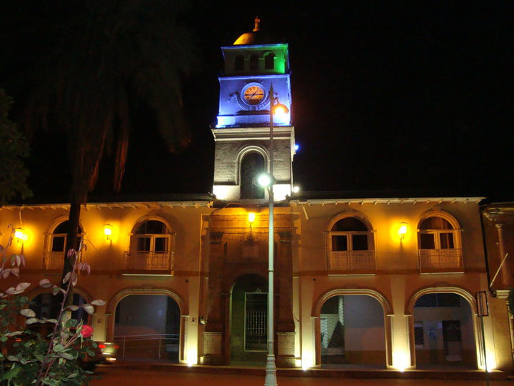 S.J Chimbo